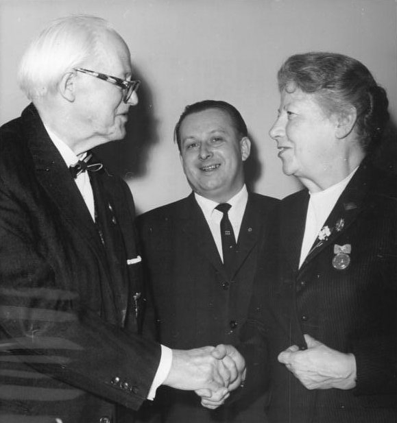 Zentralbild Hochneder schl-pr 7.3.1967 Mit der Deutschen Friedensmedaille ... zeichnete der Präsident des Friedensrates der Deutschen Demokratischen Republik, Prof. Dr. Dr. h.c. Walter Friedrich (links), anläßlich des Internationalen Frauentags und des 20. Jahrestages der DFD am 7.3.1967 acht hervorragende Frauen aus. Zu den Geehrten gehörte Frau Lilly Becher (rechts), die Leiterin des Johannes-R. Becher-Archivs.